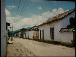 Guanape